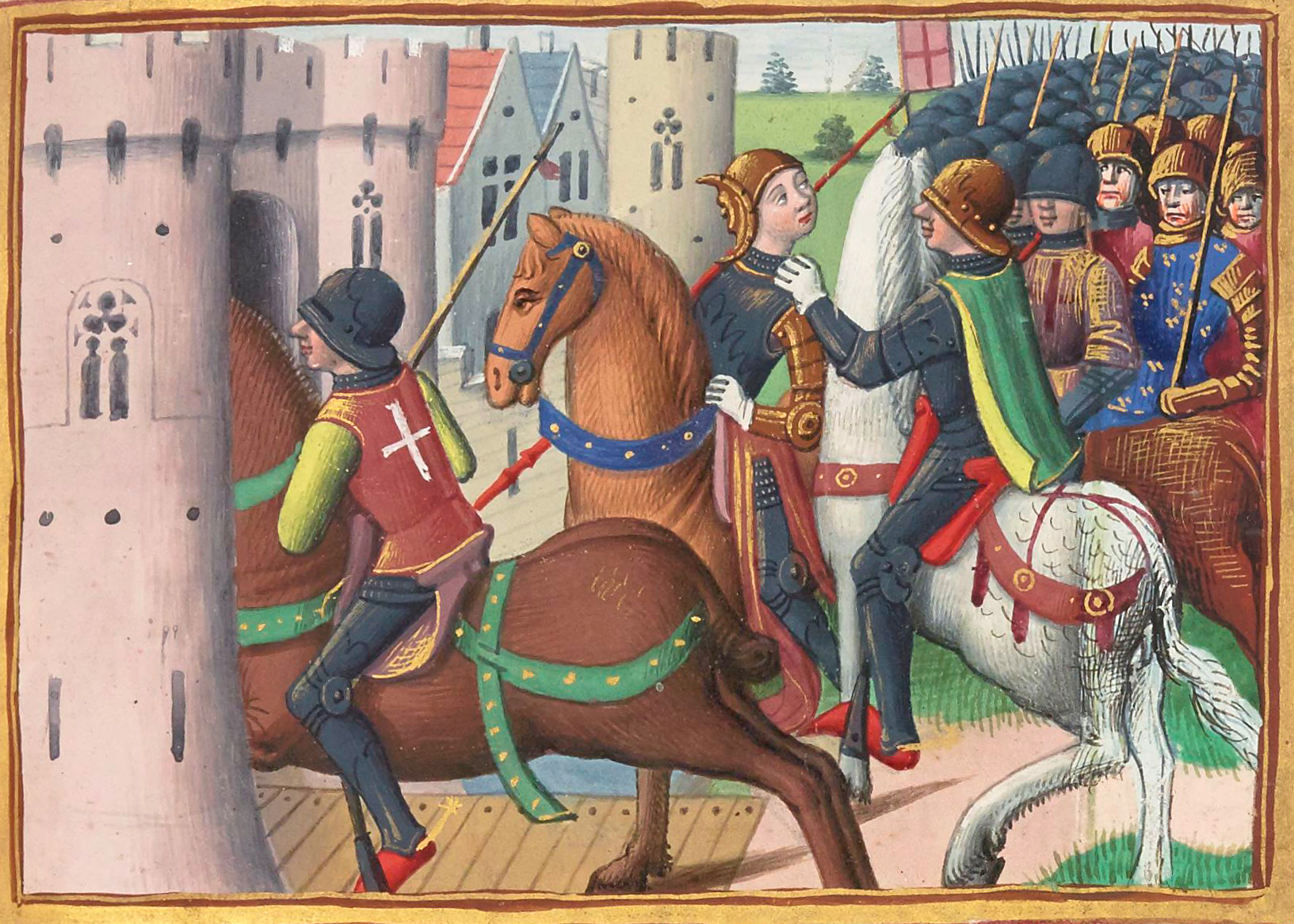 La capture de Jeanne d'Arc par les Bourguignons lors du siège de Compiègne, le 14 mai 1430.